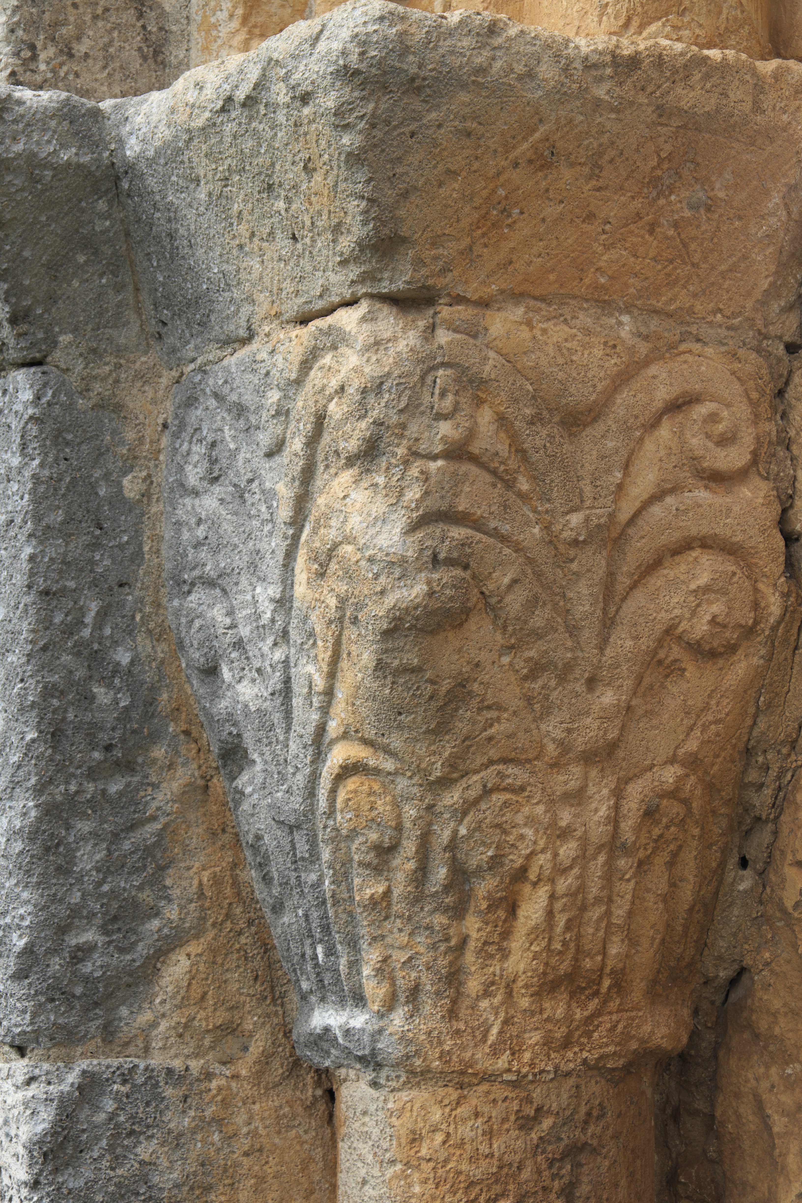 Ermita del Santo Cristo de San Sebastián in Coruña del Conde in der Provinz Burgos ((Kastilien-León/Spanien), Kapitell am Rundbogenportal an der Südseite